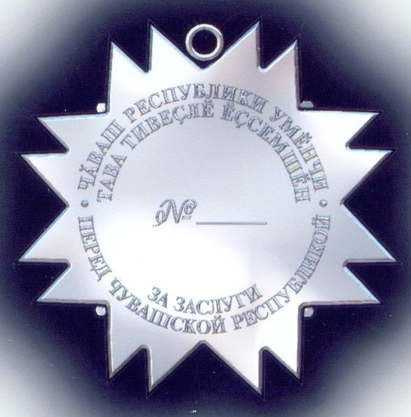 Орден За заслуги перед Чувашской Республикой - реверс